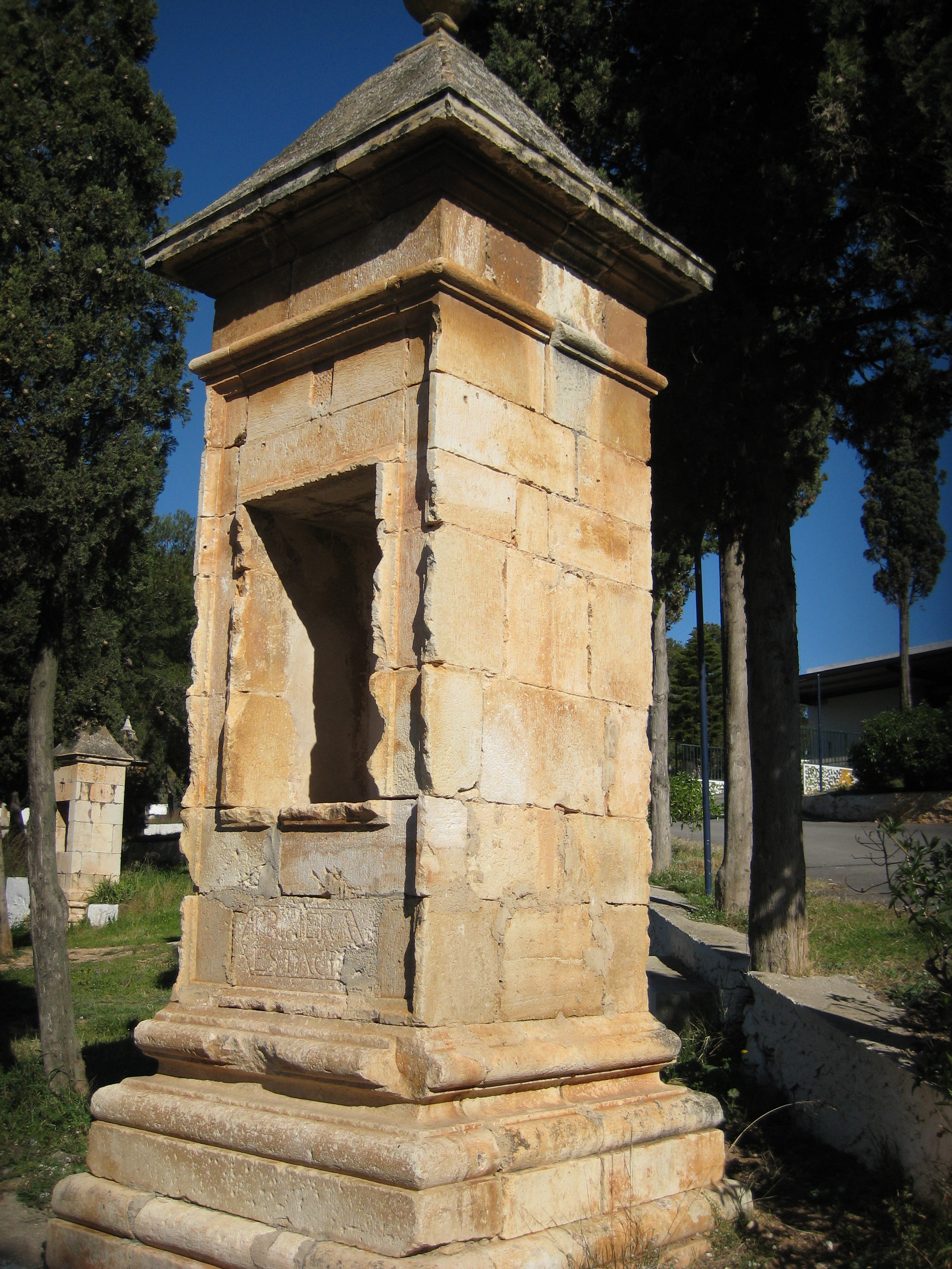 Primera estació del Calvari de Torreblanca (Plana Alta)